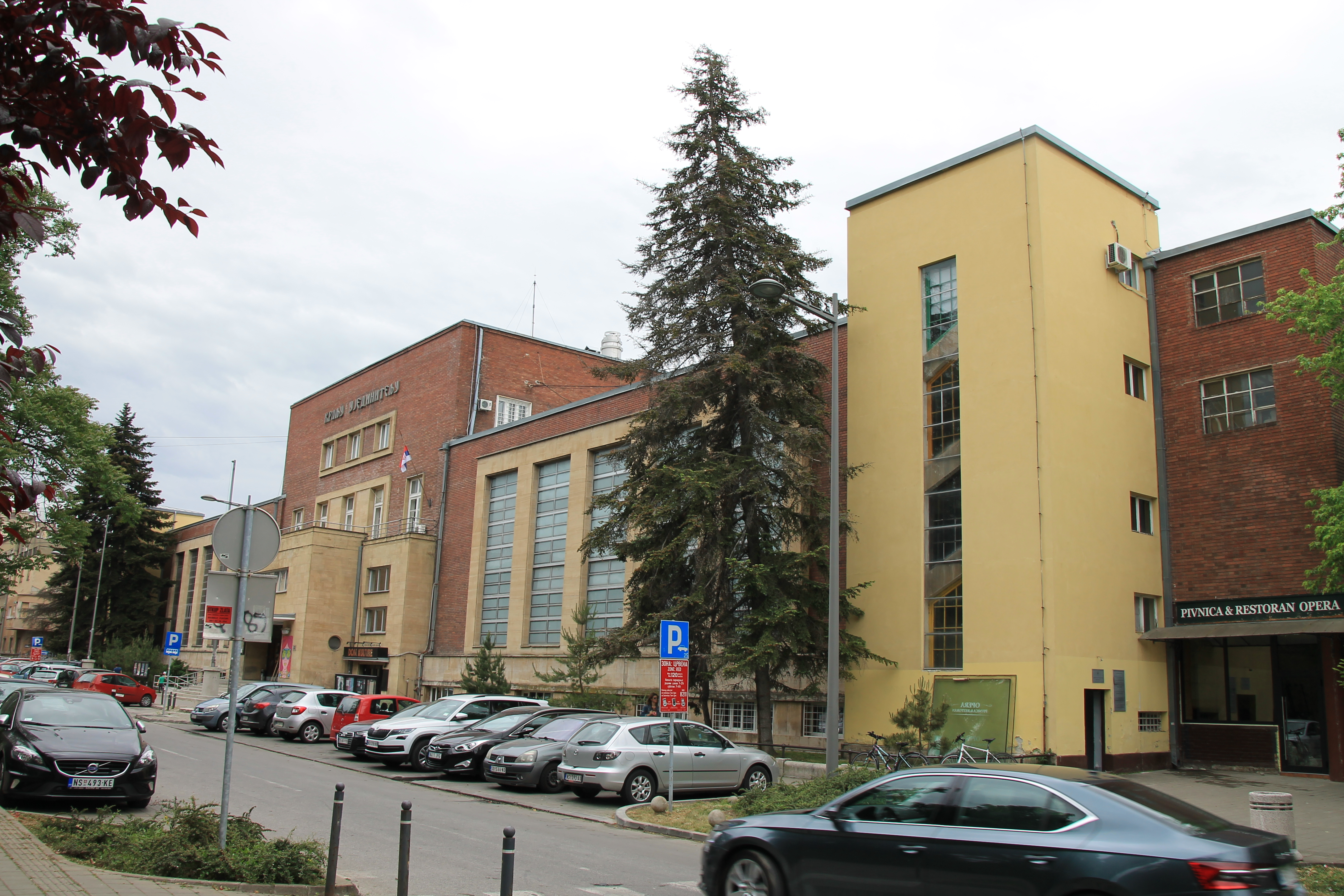 Zgrada Sokolskog doma